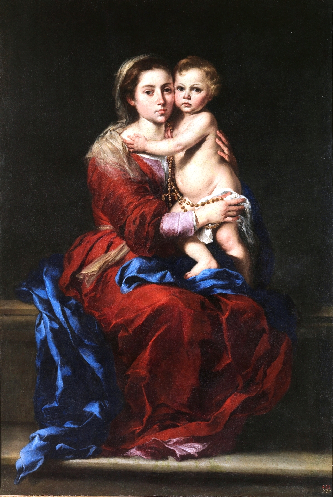 La obra representa a la Virgen María llevando al Niño Jesús sobre sus rodillas y un rosario.